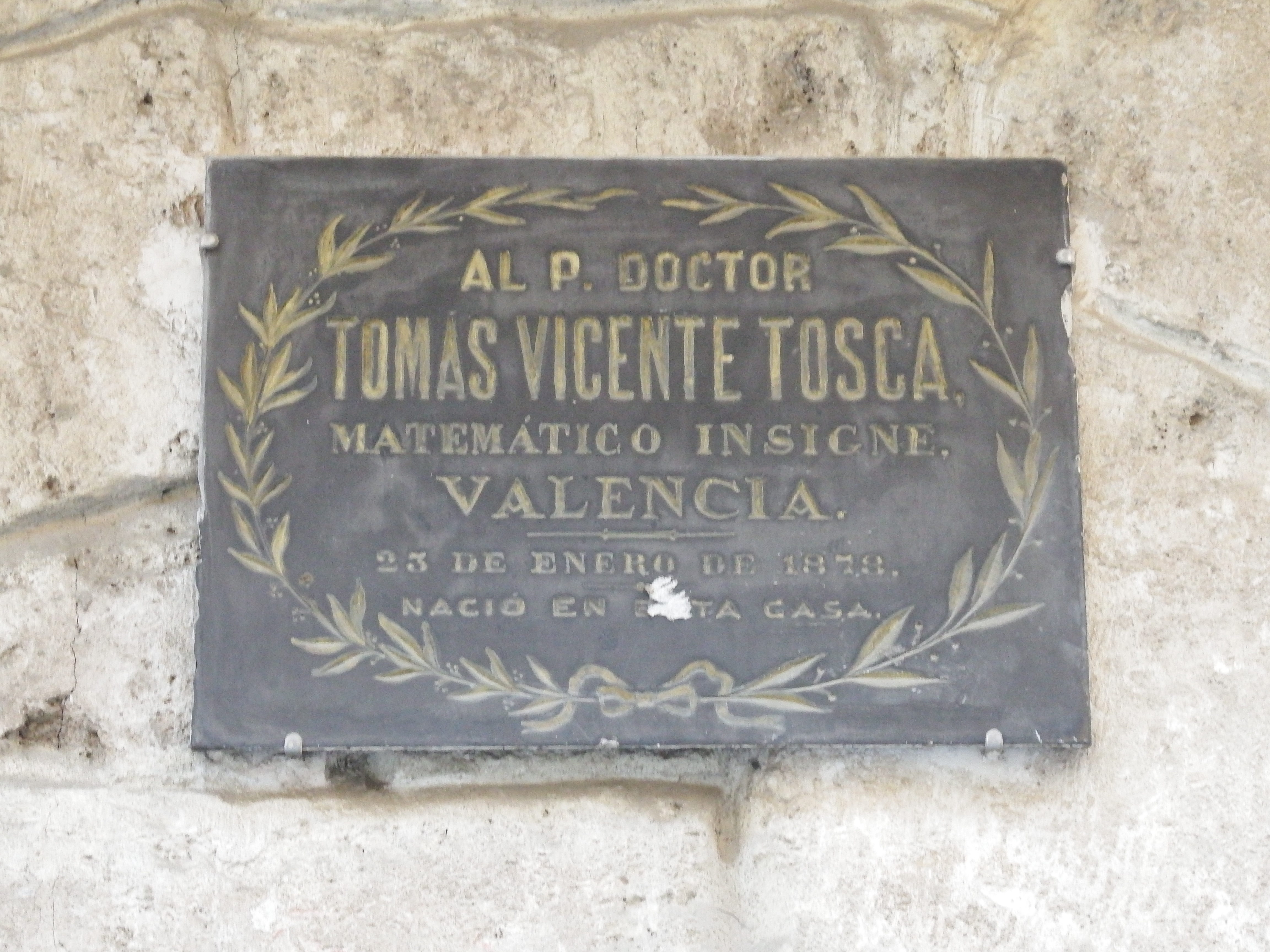 Placa Tomás Vicente Tosca, calle Serranos